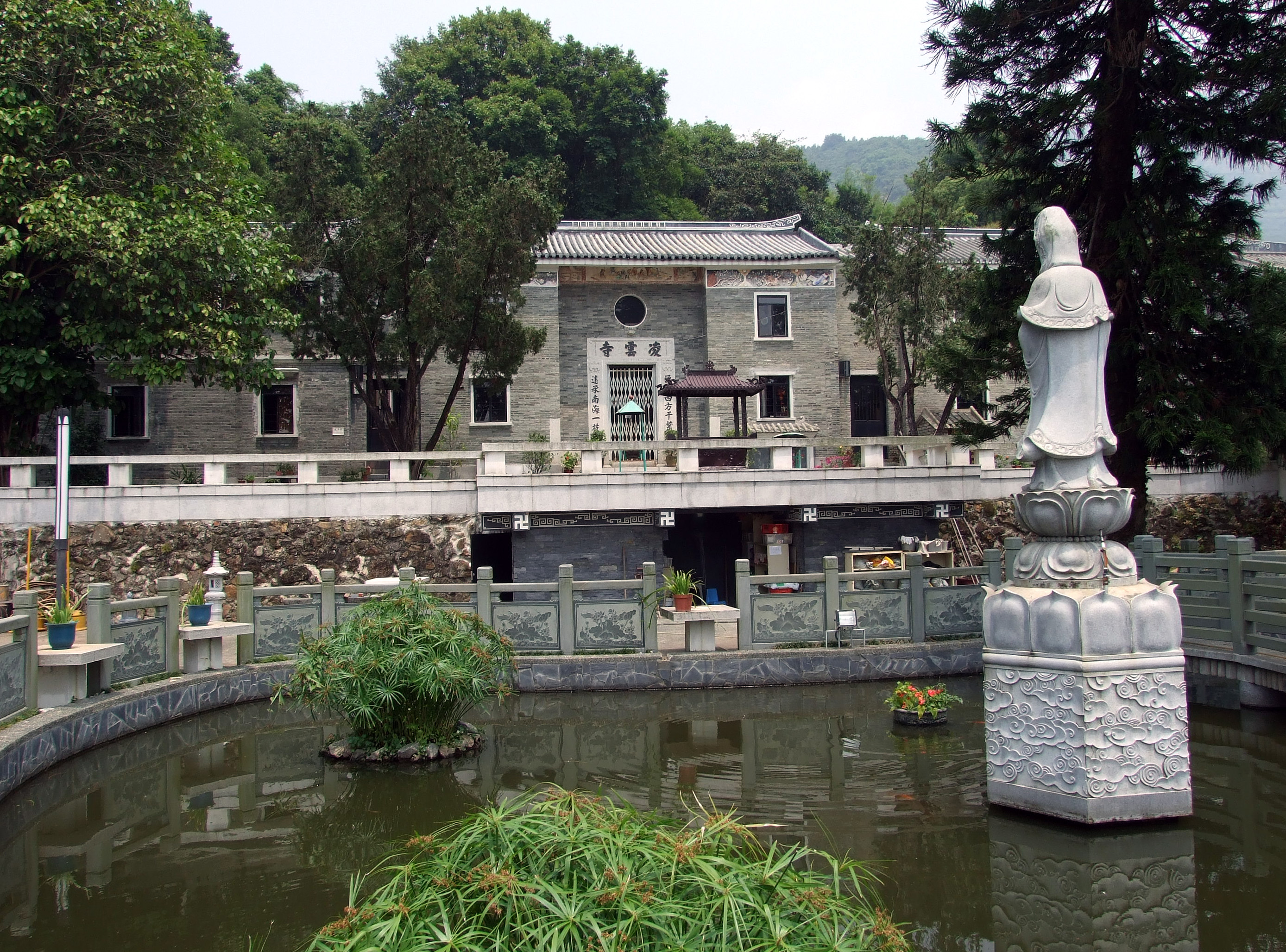 中文（香港）: 凌雲寺